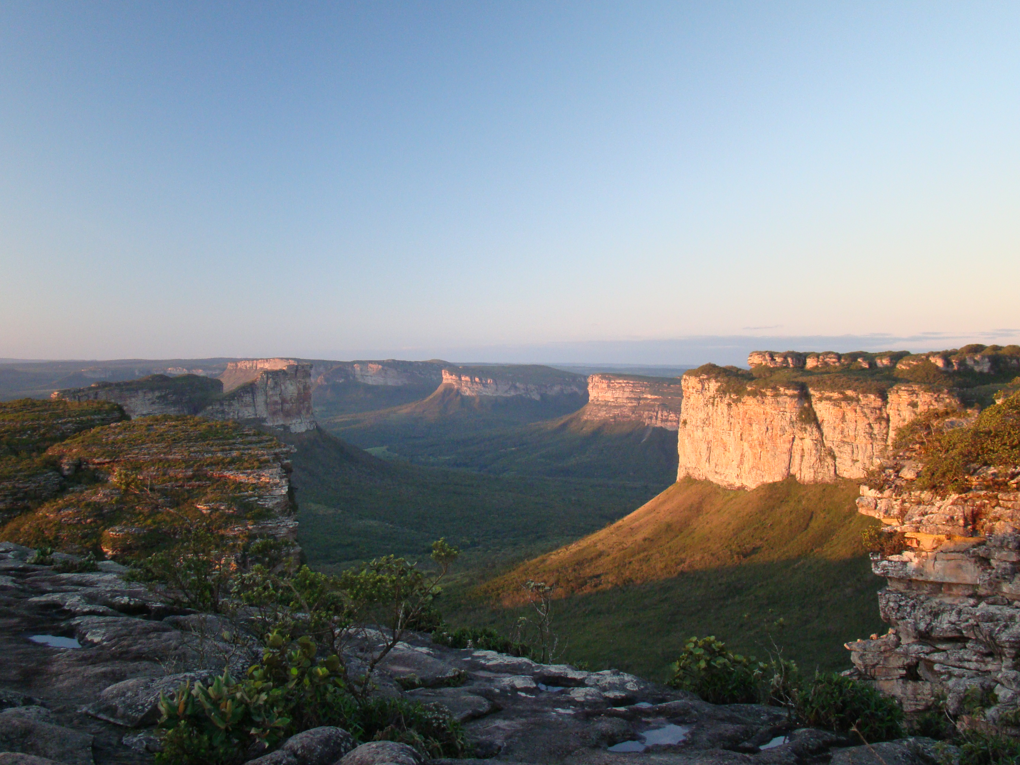 Morro do Pai Inácio - Lençóis - Bahia - Brasil